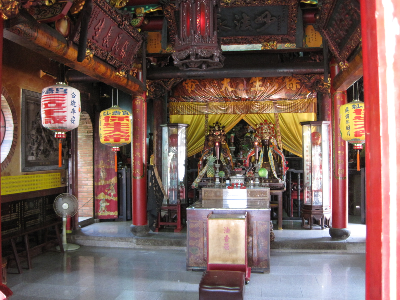 中文（台灣）: 臺南市安平妙壽宮正殿。